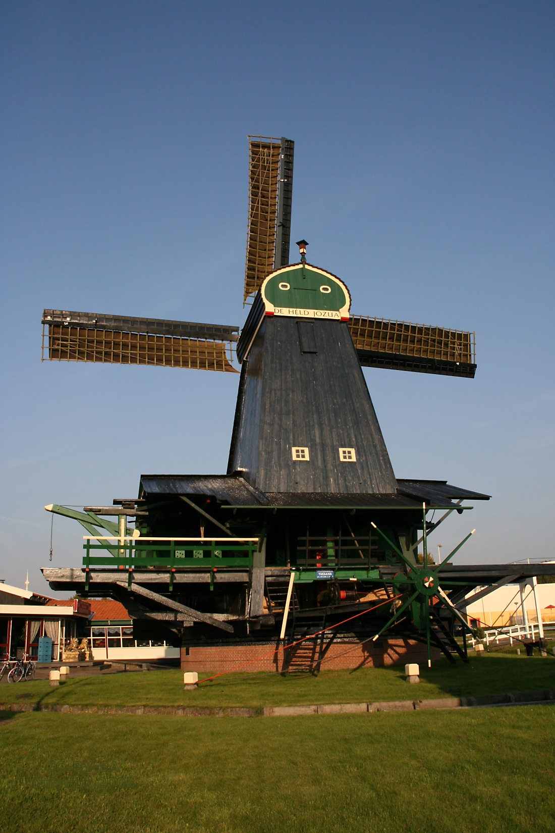 Zaandam: paltrokmolen De Held Jozua (achterzijde)